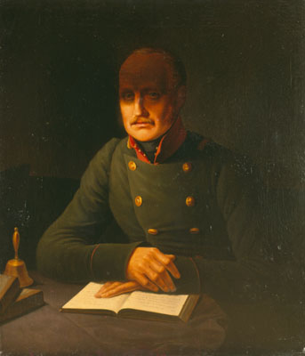 Aleksander Hripkov (1799-?): Porträt des Gustav von Craffström (1840). Gemäldegalerie der Universität Tartu